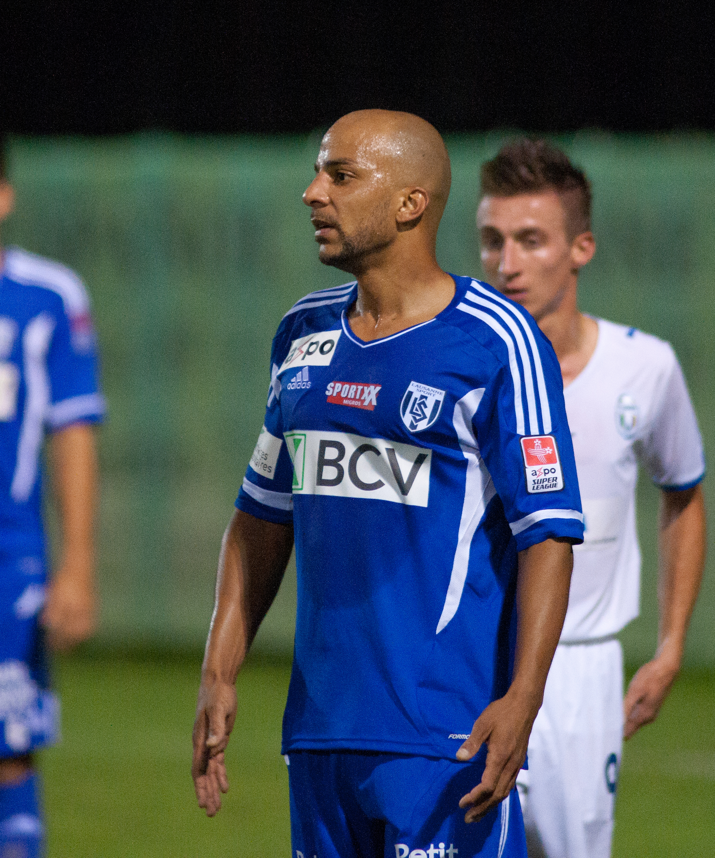 Peter Luccin avec le Lausanne Sport.